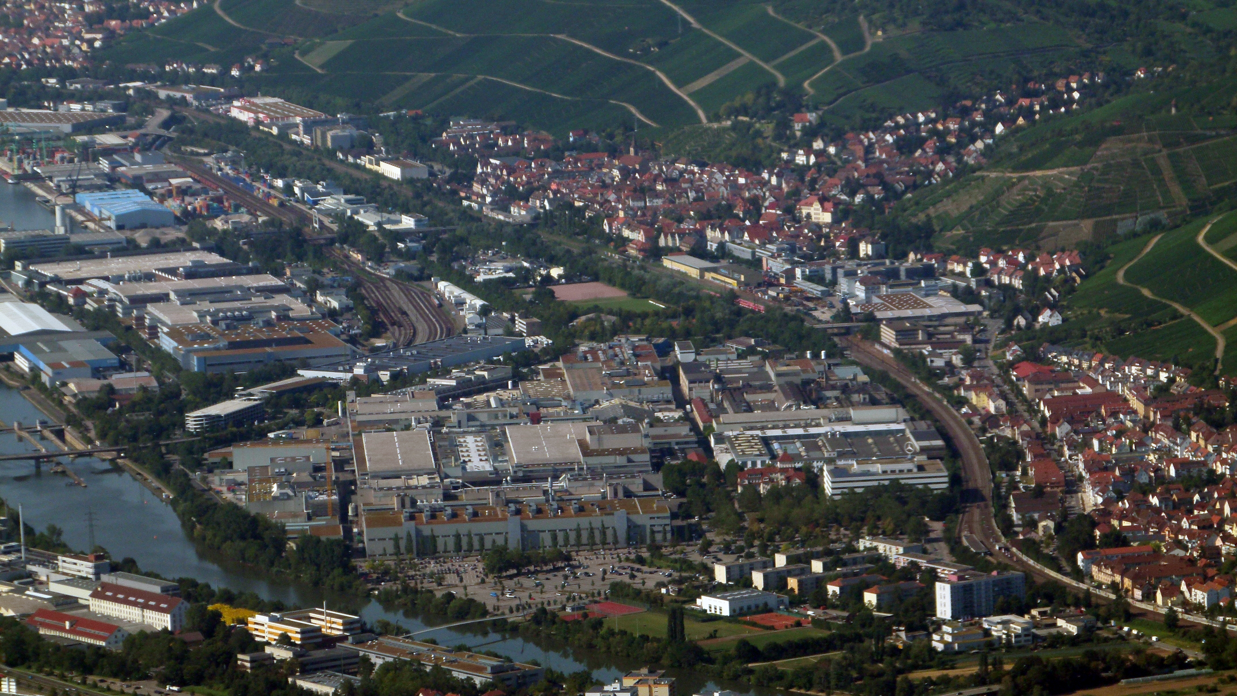 Obertürkheim (rechts oben), Mettingen (rechts unten), mit Mercedes-Benz Werkteilen Heidefingen (links) und Mettingen (Vordergrund)